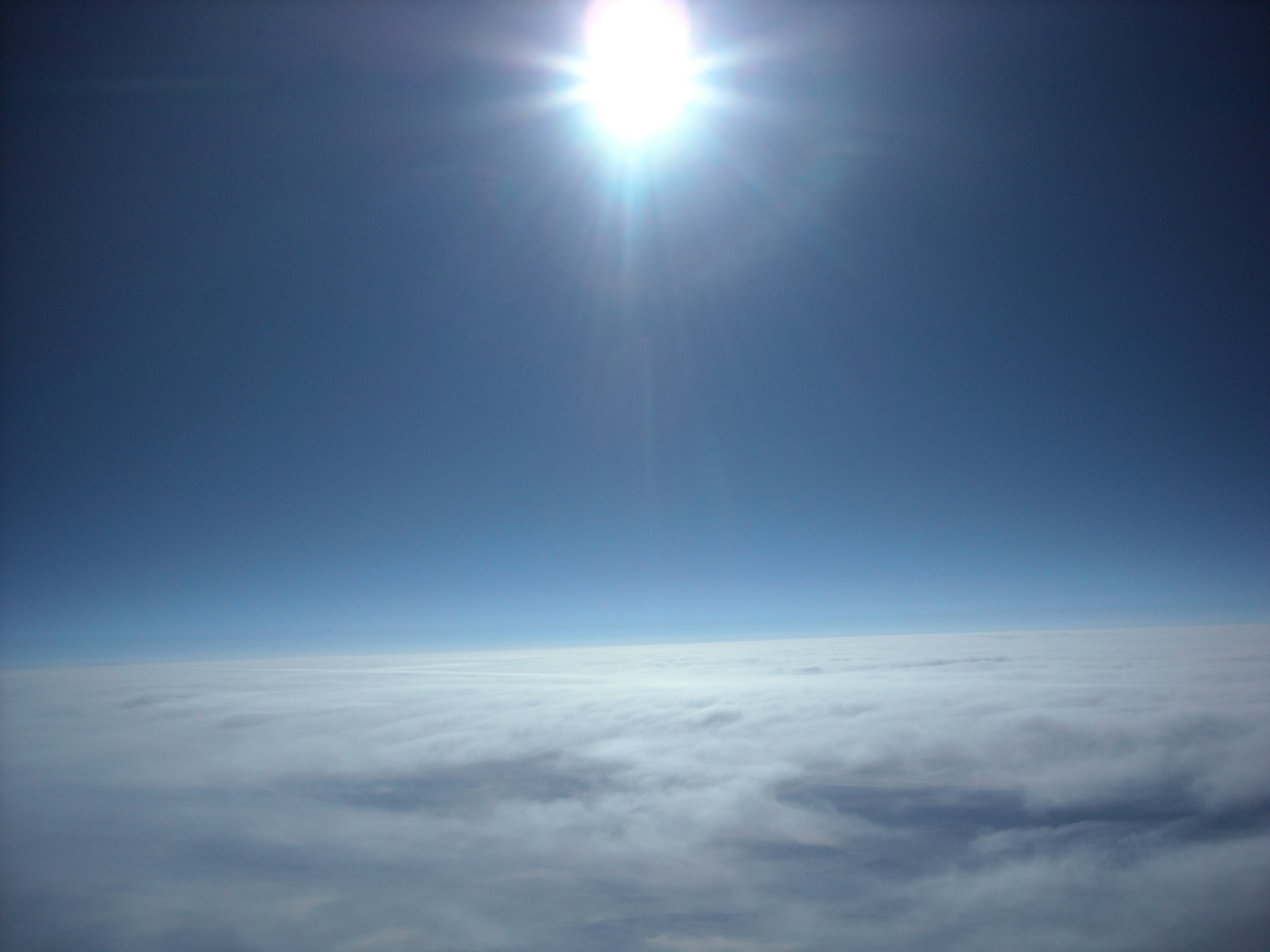 Atmósfera de la tierra.